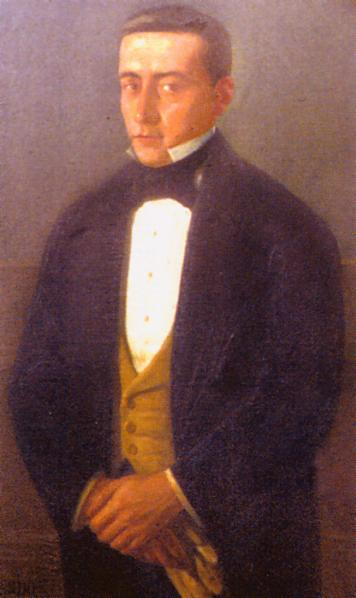 José María Pando (Lima, 1787 - Madrid, 1840) escritor y político peruano.